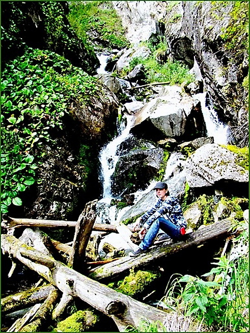 В ущельях Прителецкой тайги. 20 августа 2010.